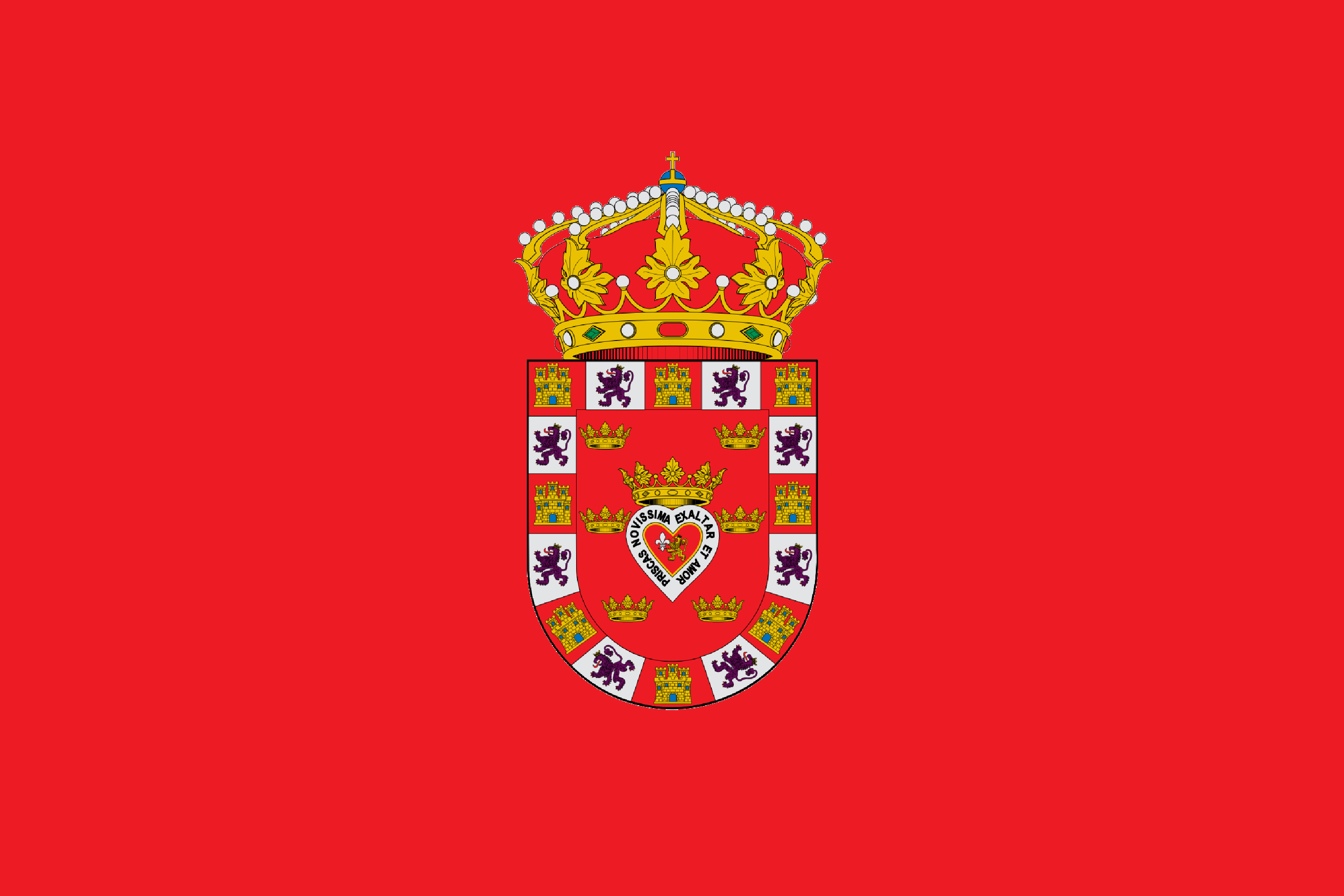 Bandera de Murcia2.0